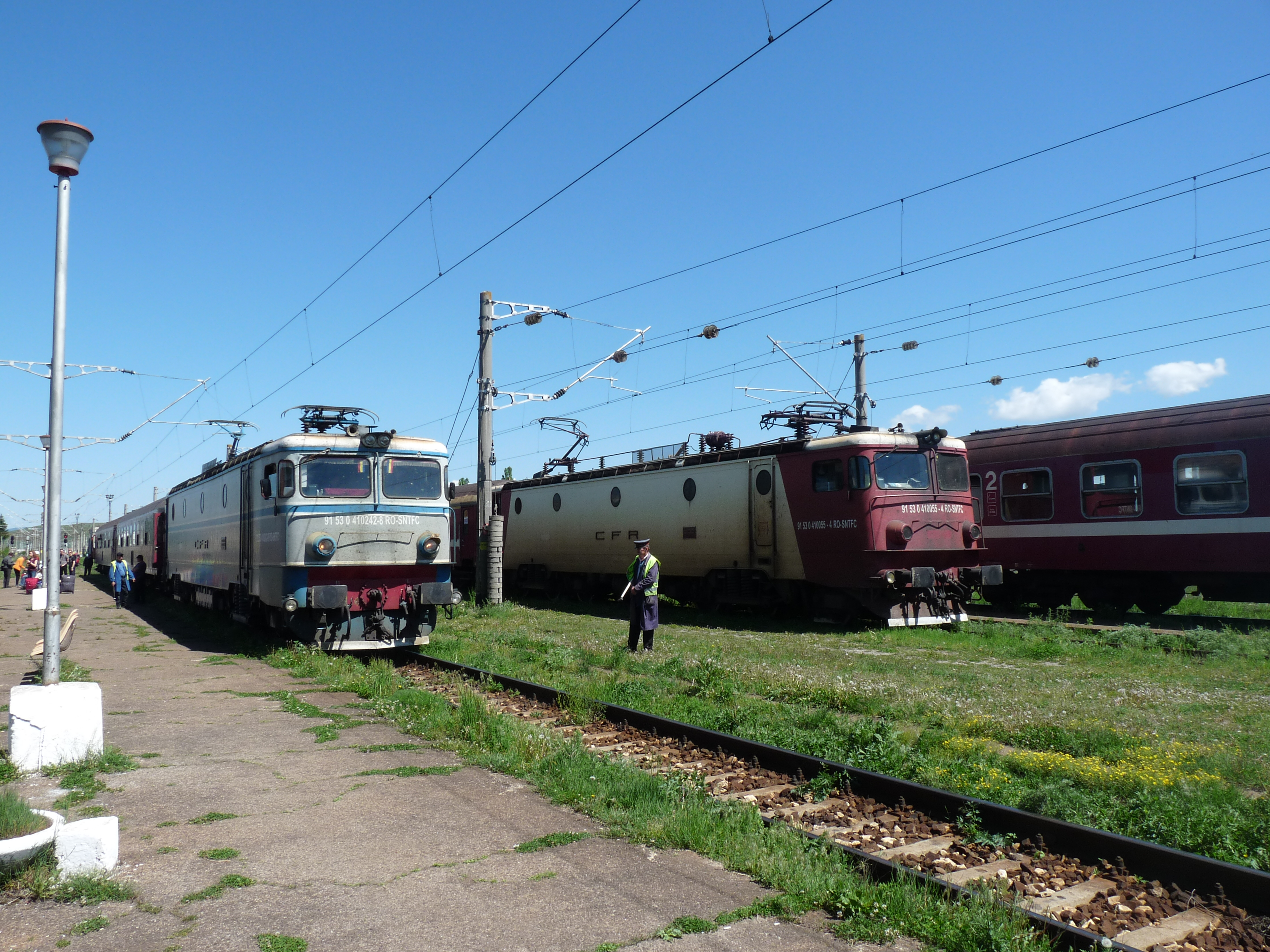 Station Siculeni